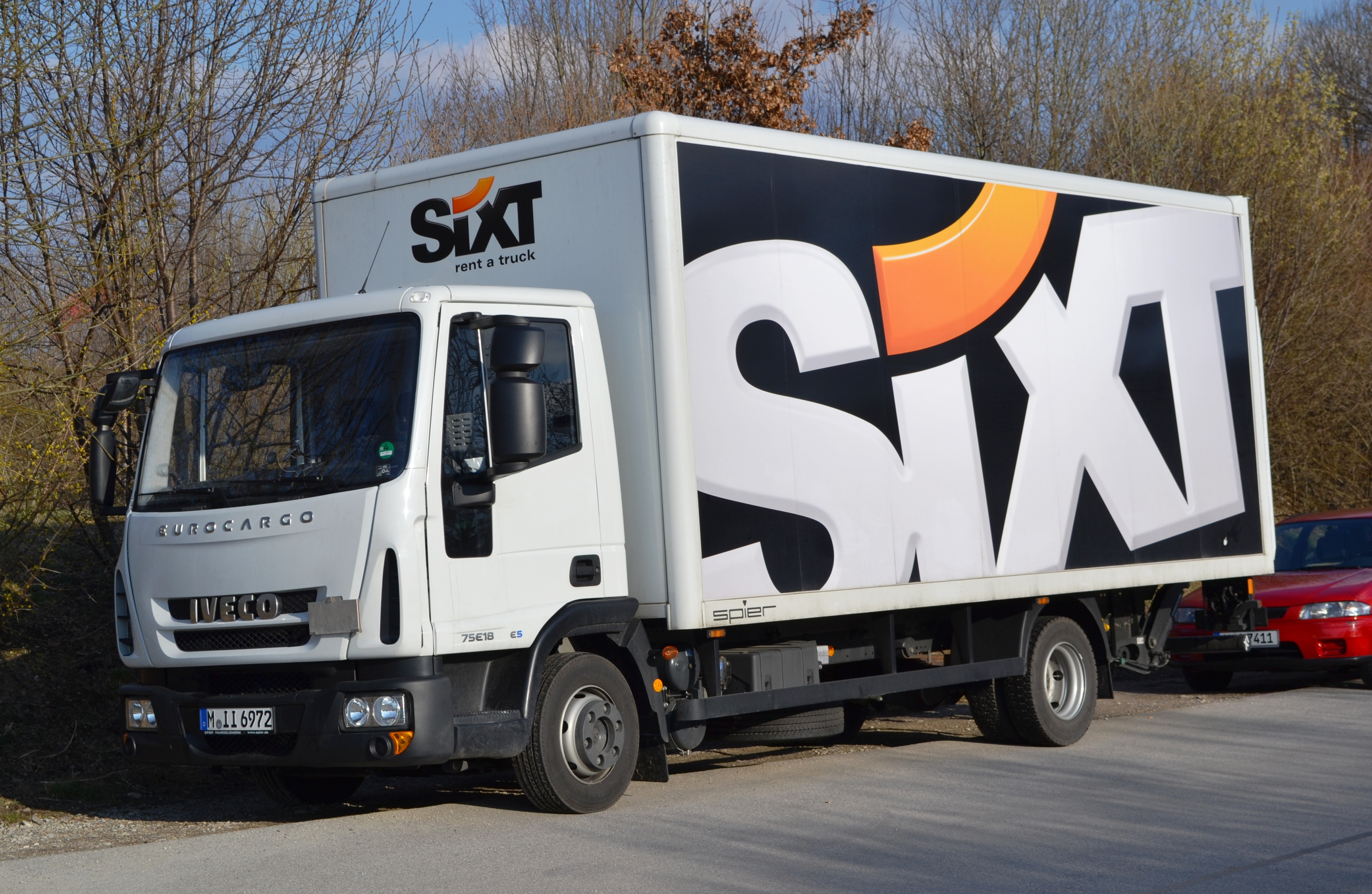 Iveco 75E18 E5 LKW von Sixt Verleih.